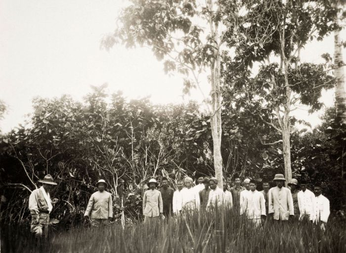 negatief. Portret van gezaghebber Kelly, Pangeran Bandahara van Sambas, de Demang, hoofden en belangstellenden die De Mol vergezelden op een tocht naar de ladangs bij Telok Kalong aan de Bantanan rivier